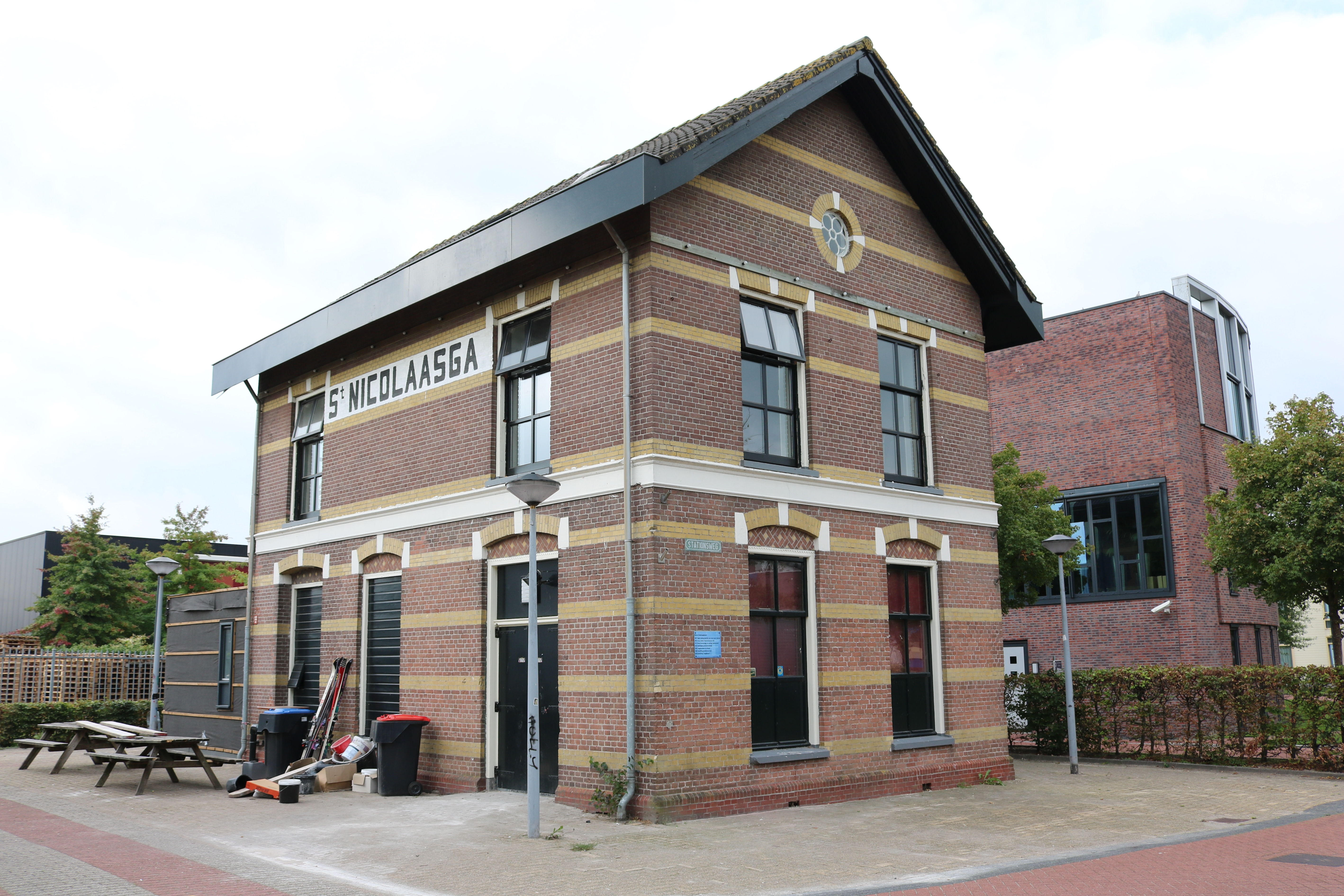 Tramstation Sint Nicolaasga (foto: Daniel van der Ree, 20 september 2018)